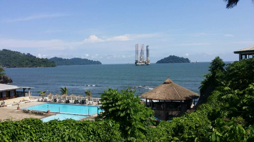 Mer au loin, Limbé, Sud-Ouest